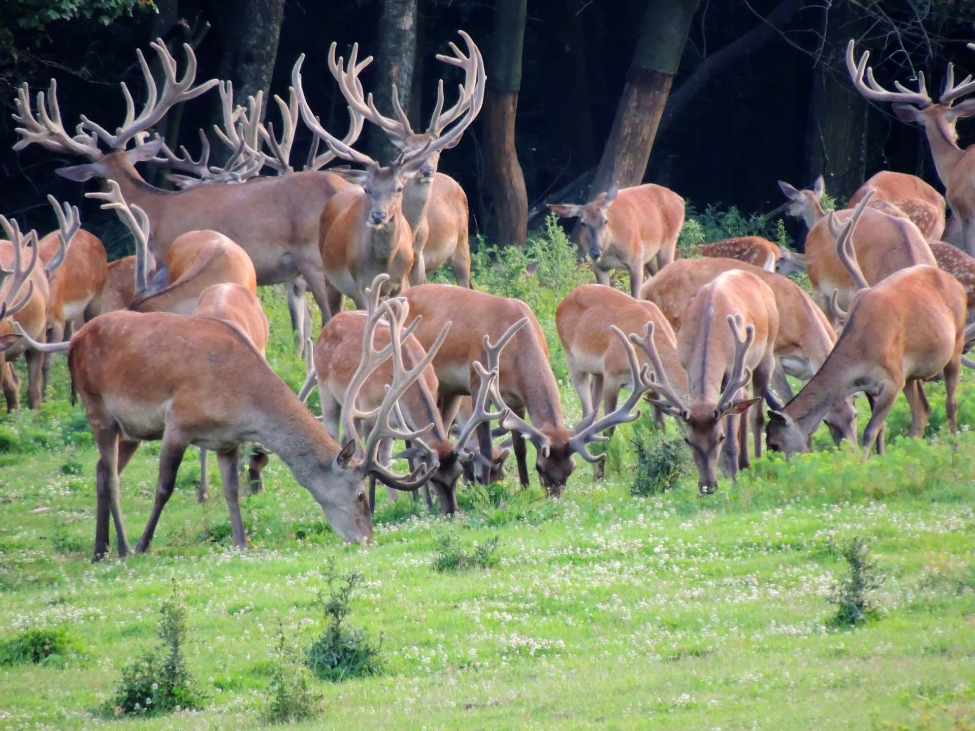 Srpski (latinica): Ово је фотографија заштићеног природног добра у Србији под шифром: НП01This is a a photo of a natural area in Serbia with ID: НП01 Крдо јелена снимљено на фрушкој гори